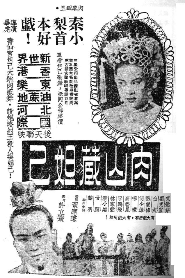 中文（香港）: 「肉山藏妲已」電影的廣告(1949年)